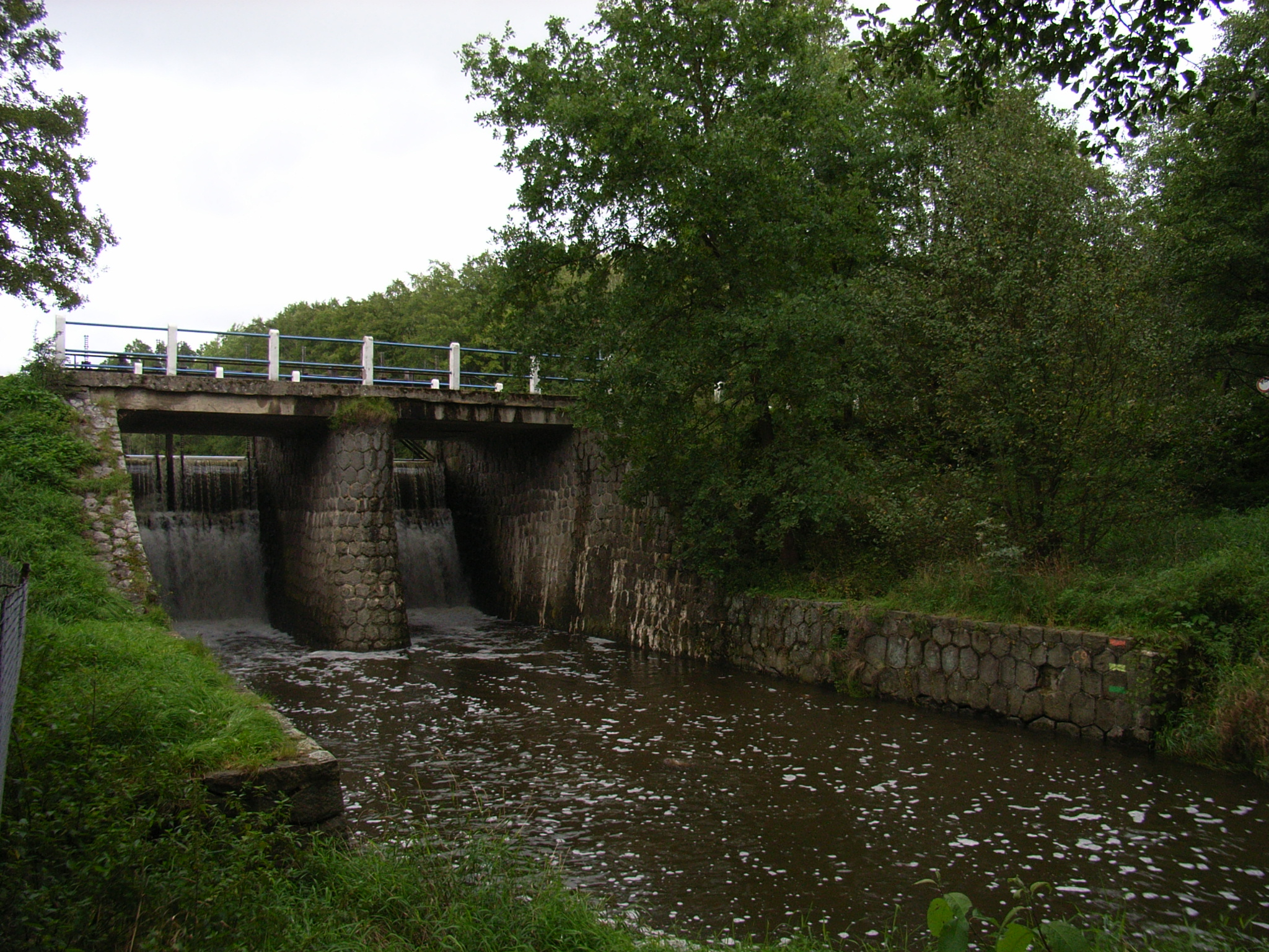 Z Malého Jordánu vytéká Košínský potok